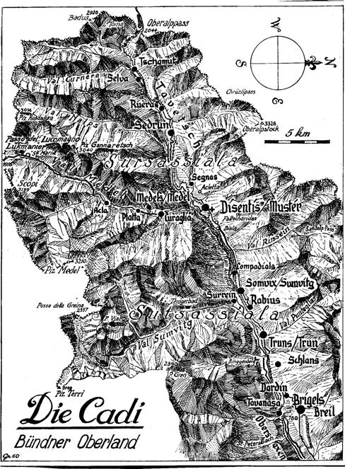 Cadì